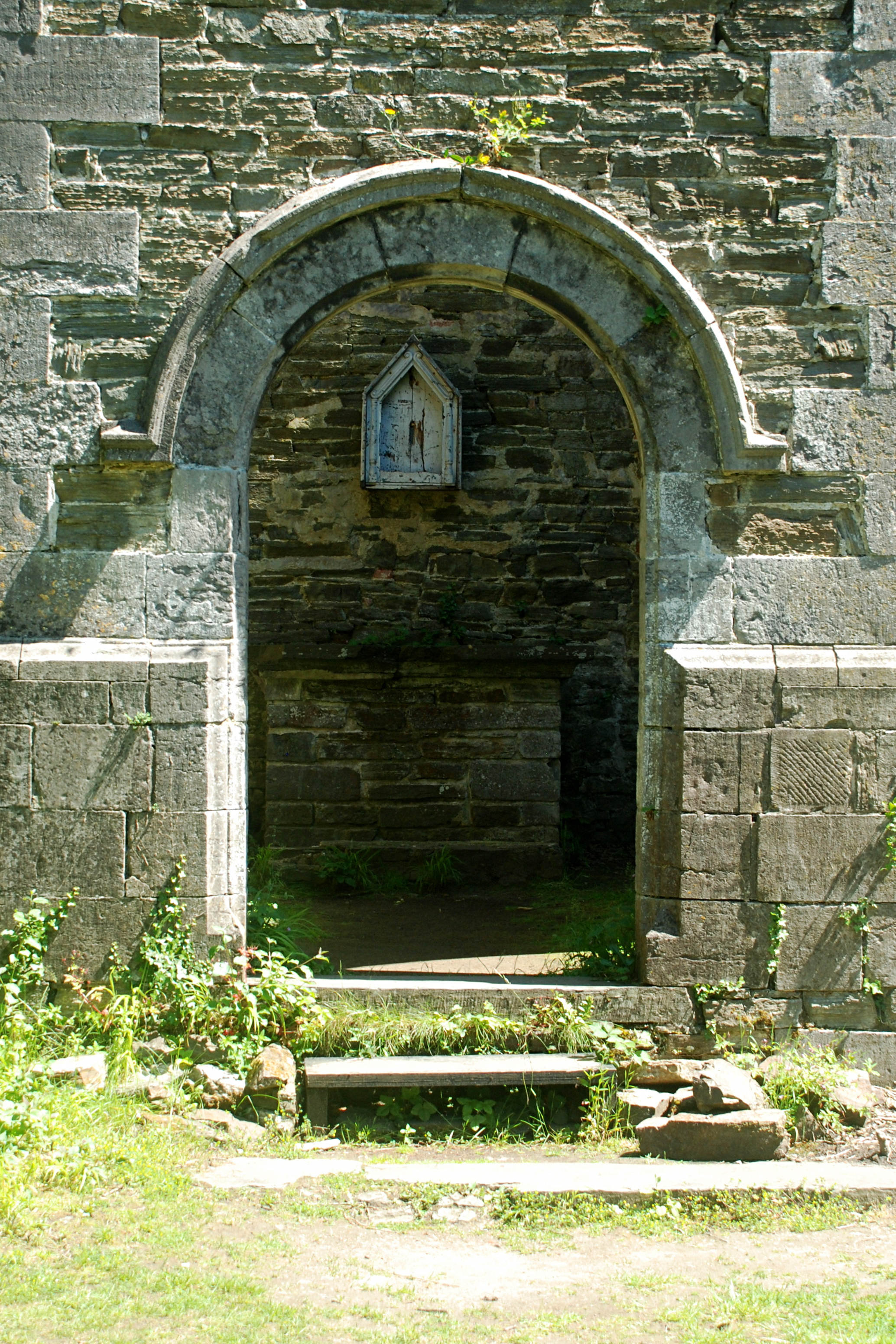 Chapelle Notre-Dame de Montaigu (Villers-la-Ville)